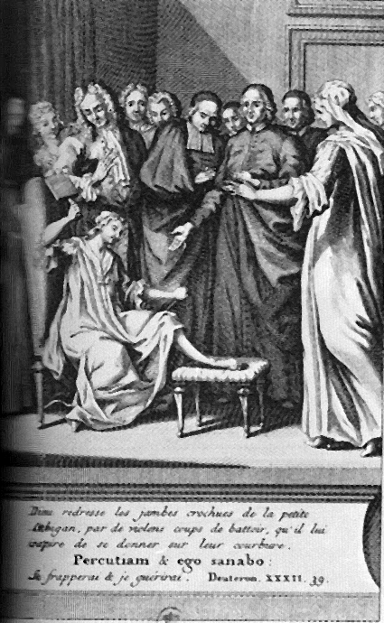 Gravure représentant un "miracle" convulsionnaire légende : Dieu redresse les jambes crochues de la petite Lebigan par de violents coups de battoir qu'il lui inspire de se donner sur leurs courbures "Je frapperai et je guérirai", Deutéronome XXXVII